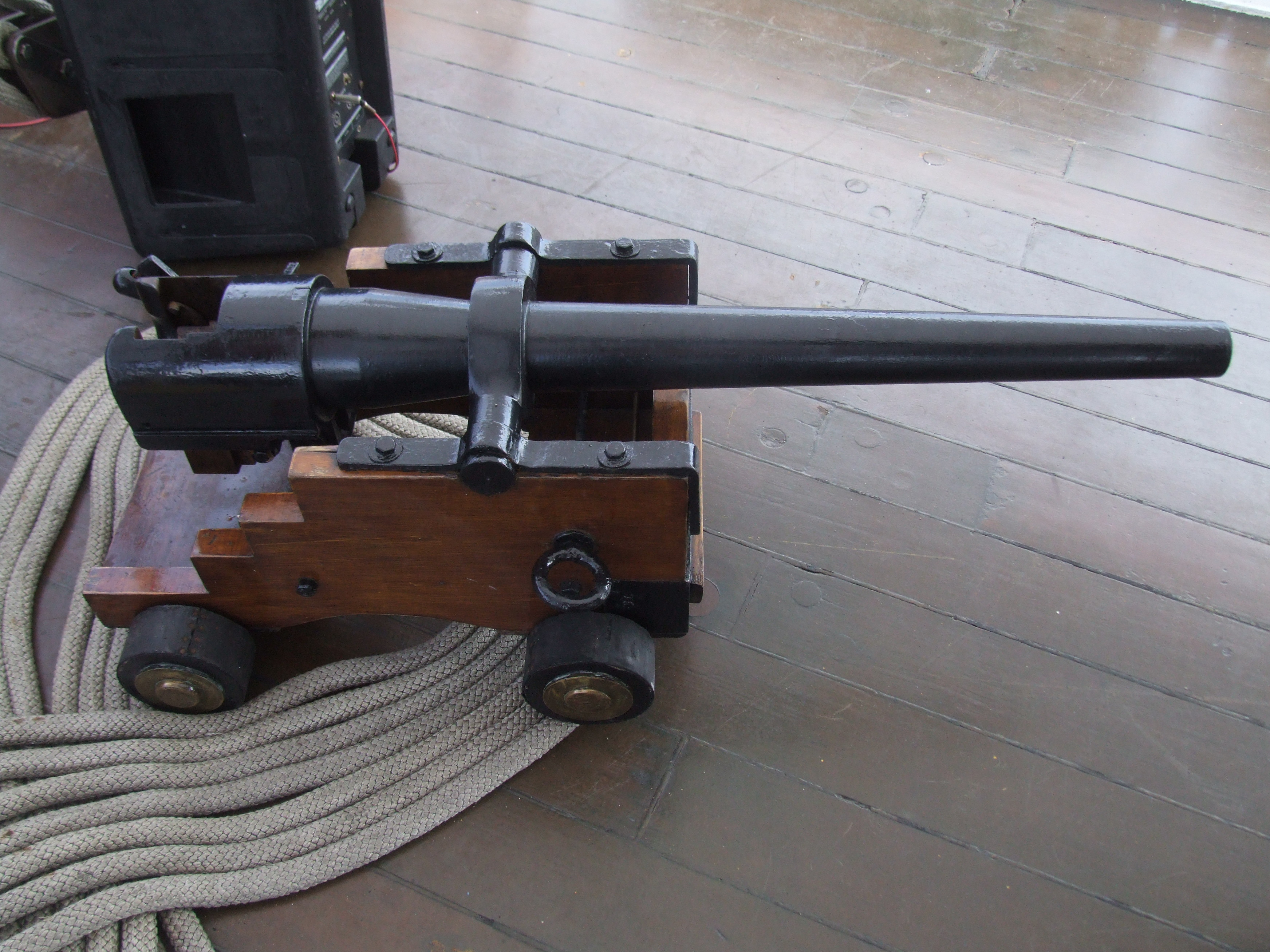 V/E Capitan Miranda